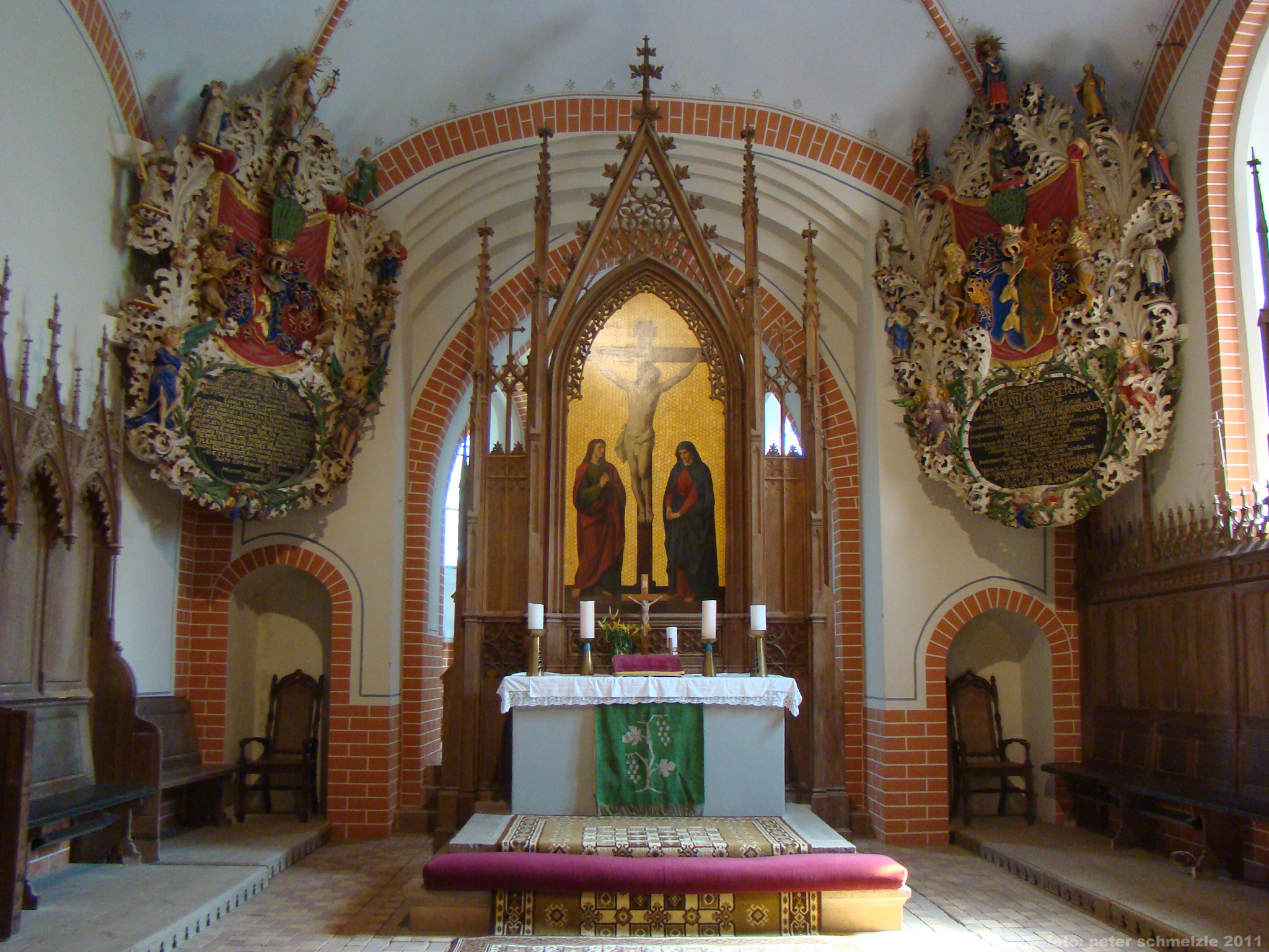 Dorfkirche in Kirch Grubenhagen, Chor mit Altar und Moltzan-Epitaphen. Foto: Peter Schmelzle, August 2011.